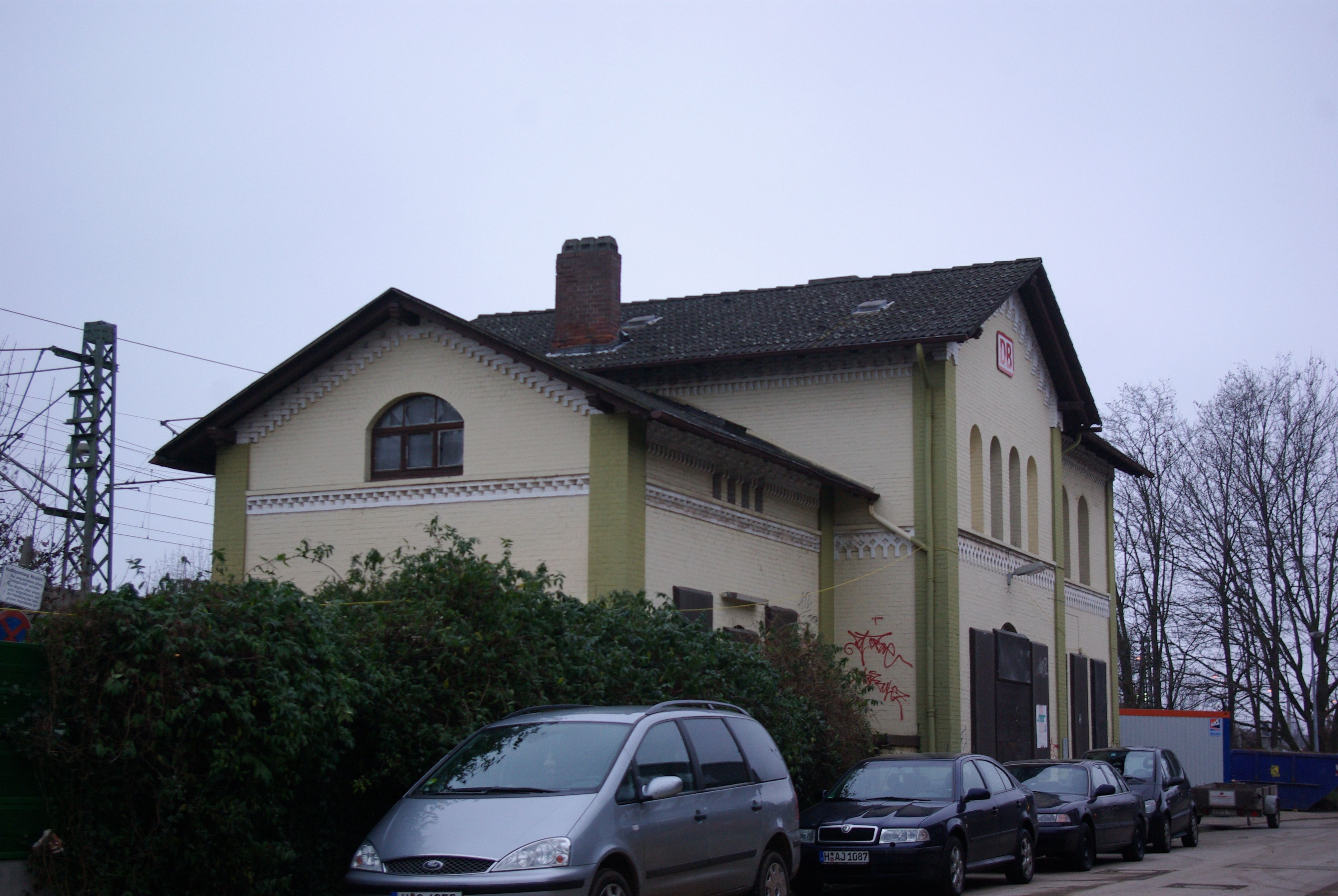 Laatzen, Ortsteil Rethen, der Bahnhof, das Bahnhofsgebäude ist nicht mehr in Betrieb (geotags in den Exif-Daten).